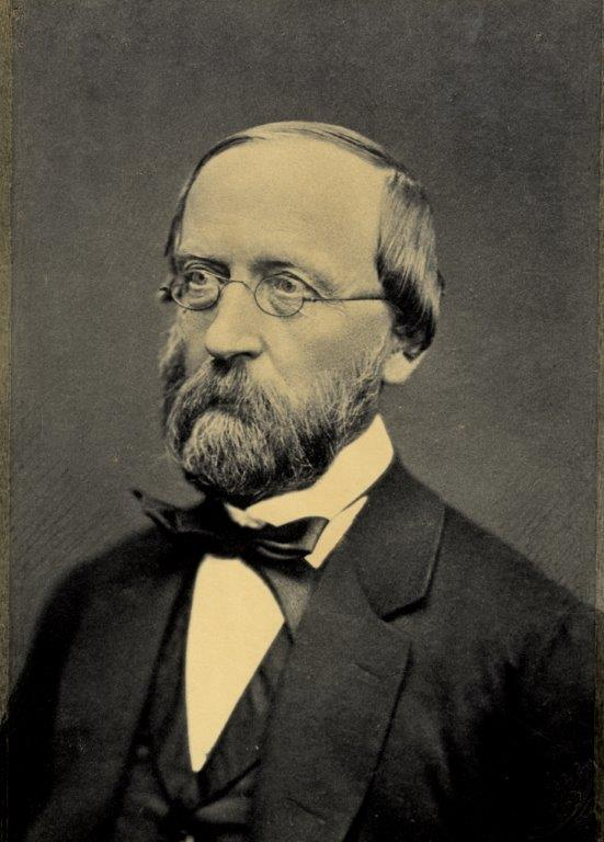 Porträtfotografie von Karl Lorentzen (1817-1888)